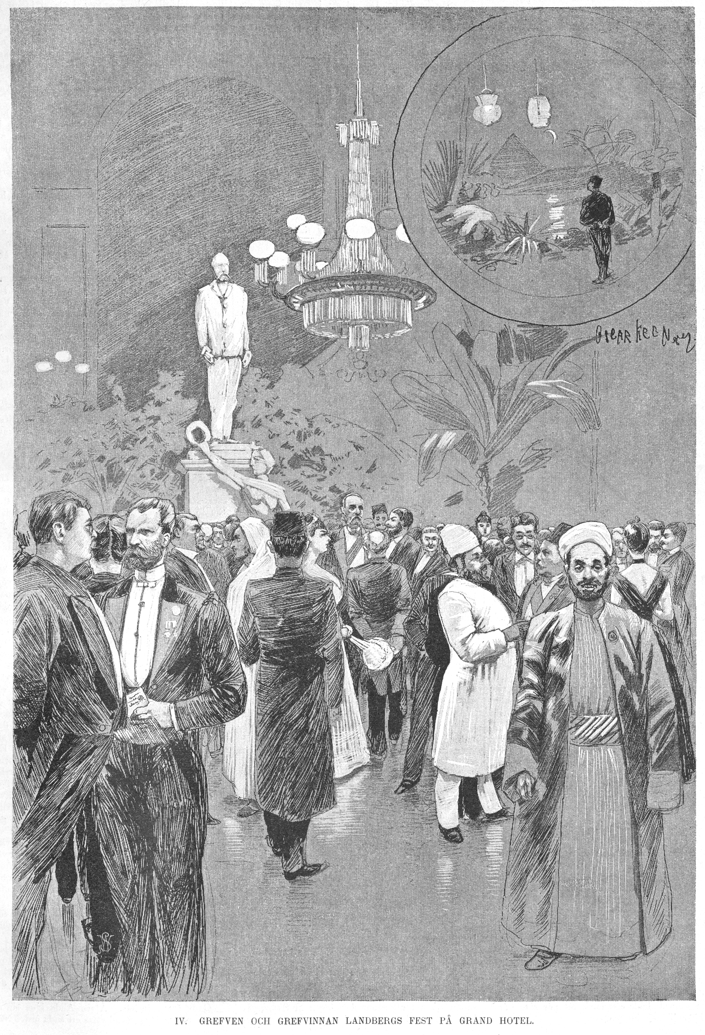 Den VIII:de internationella orientalkongressen i Stockholm och Oslo 1889. Bild från tidskriften Svea 1889.